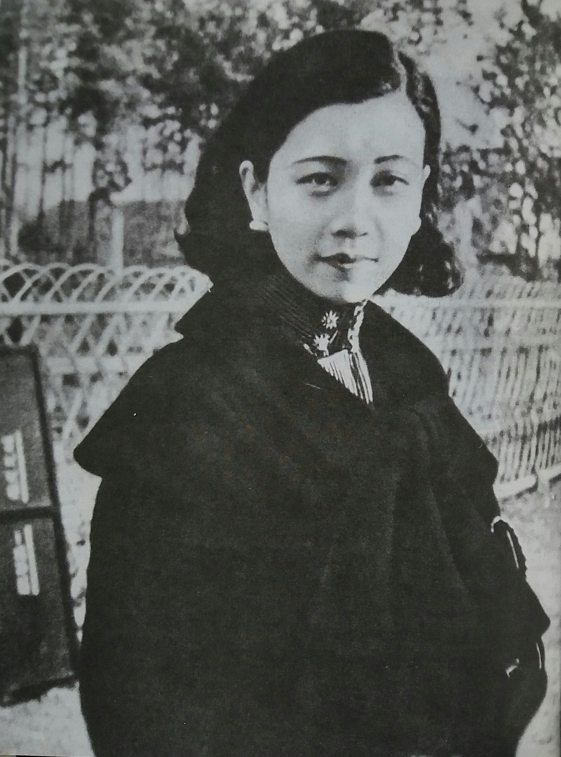 中国1930年代女影星阮玲玉